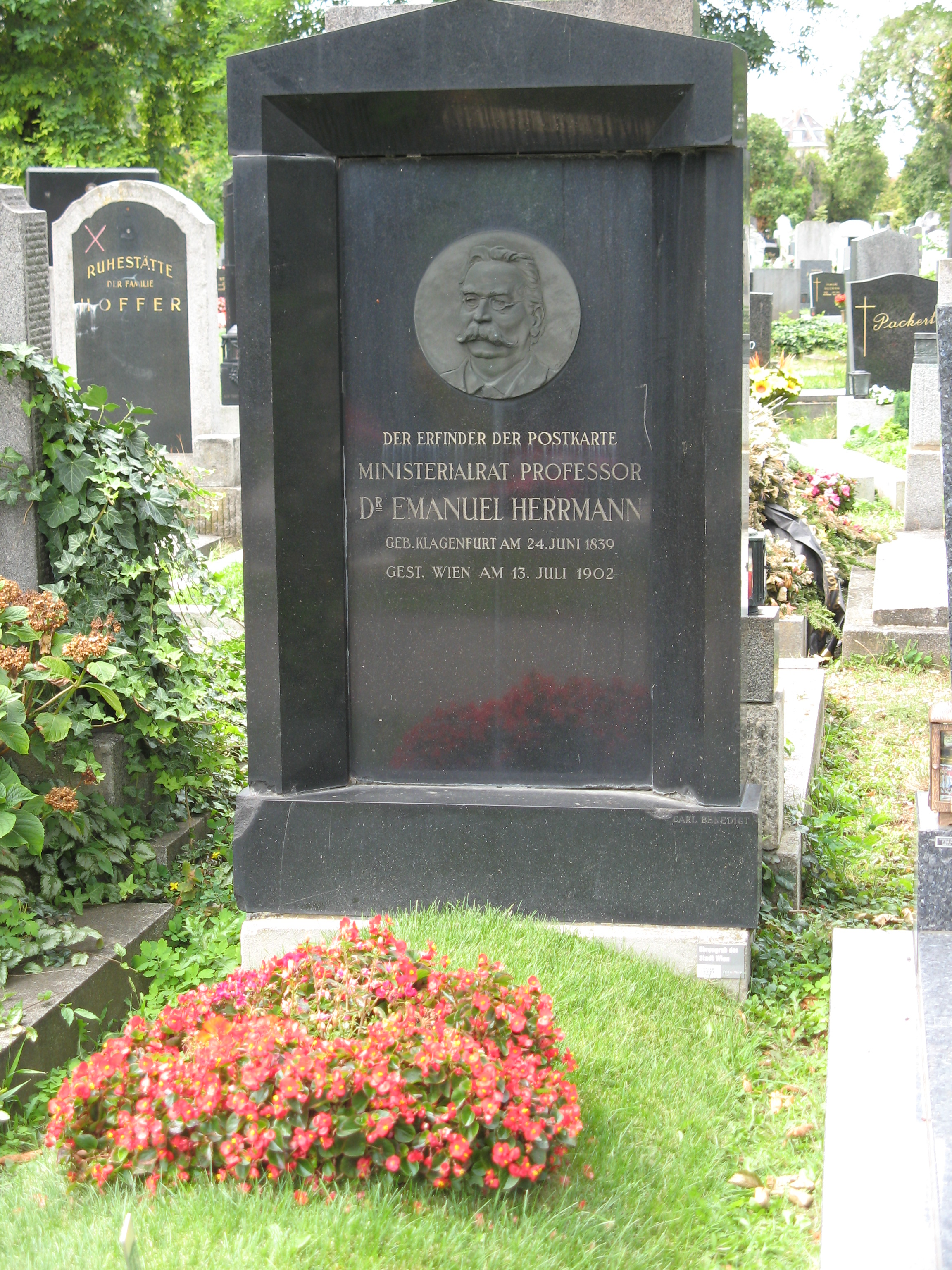 Grab von Emanuel Herrmann auf dem Friedhof Meidling in Wien